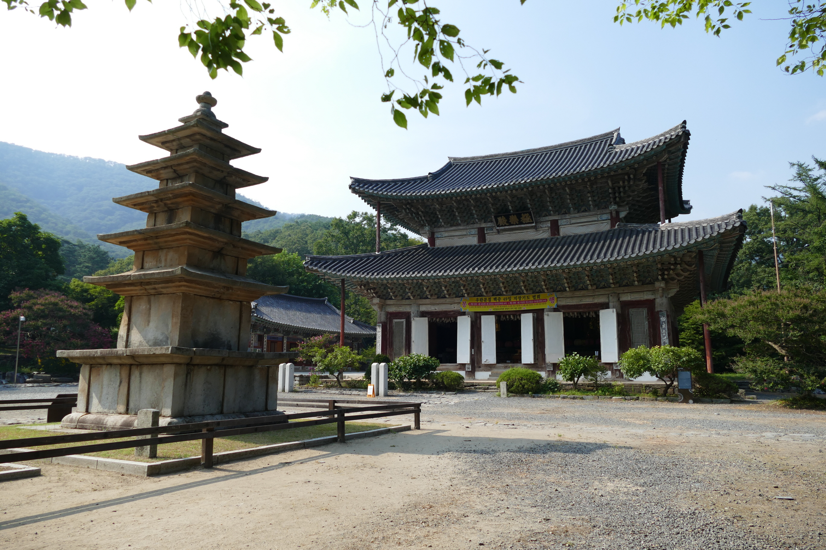 무량사 극락전